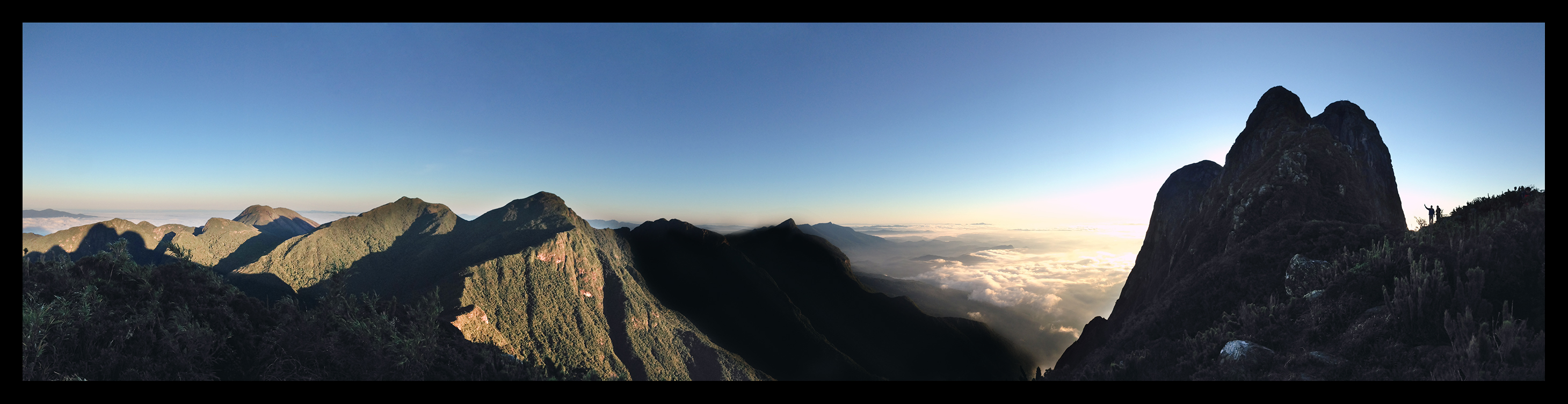 Foto panorâmica da Serra do Ibitiraquire, com o Pico Paraná em destaque.